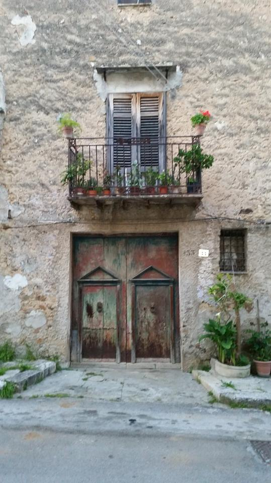 Edificio primi del novecento